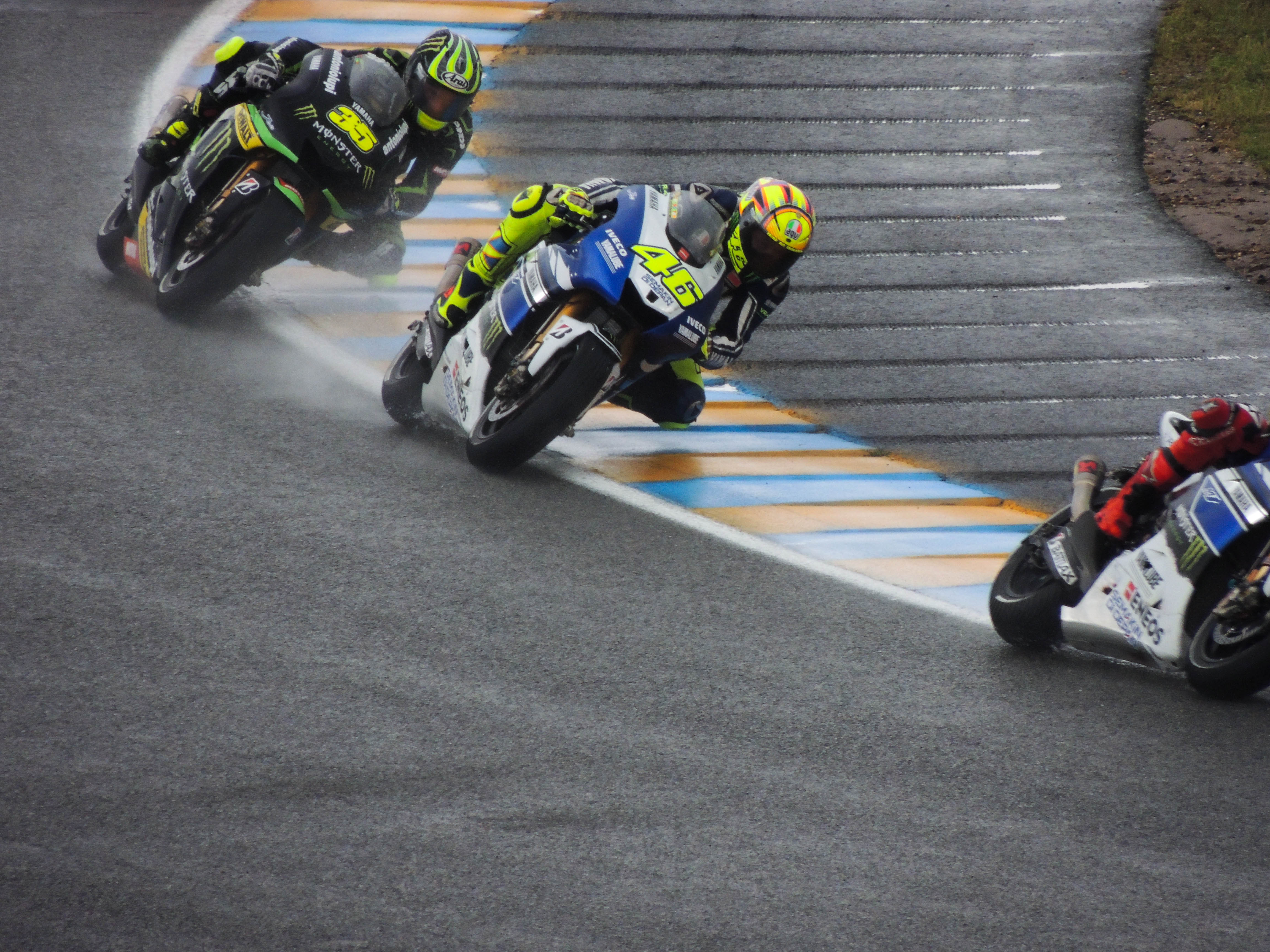 Valentino Rossi et Cal Crutchlow lors du grand prix de France moto au Mans en 2013.